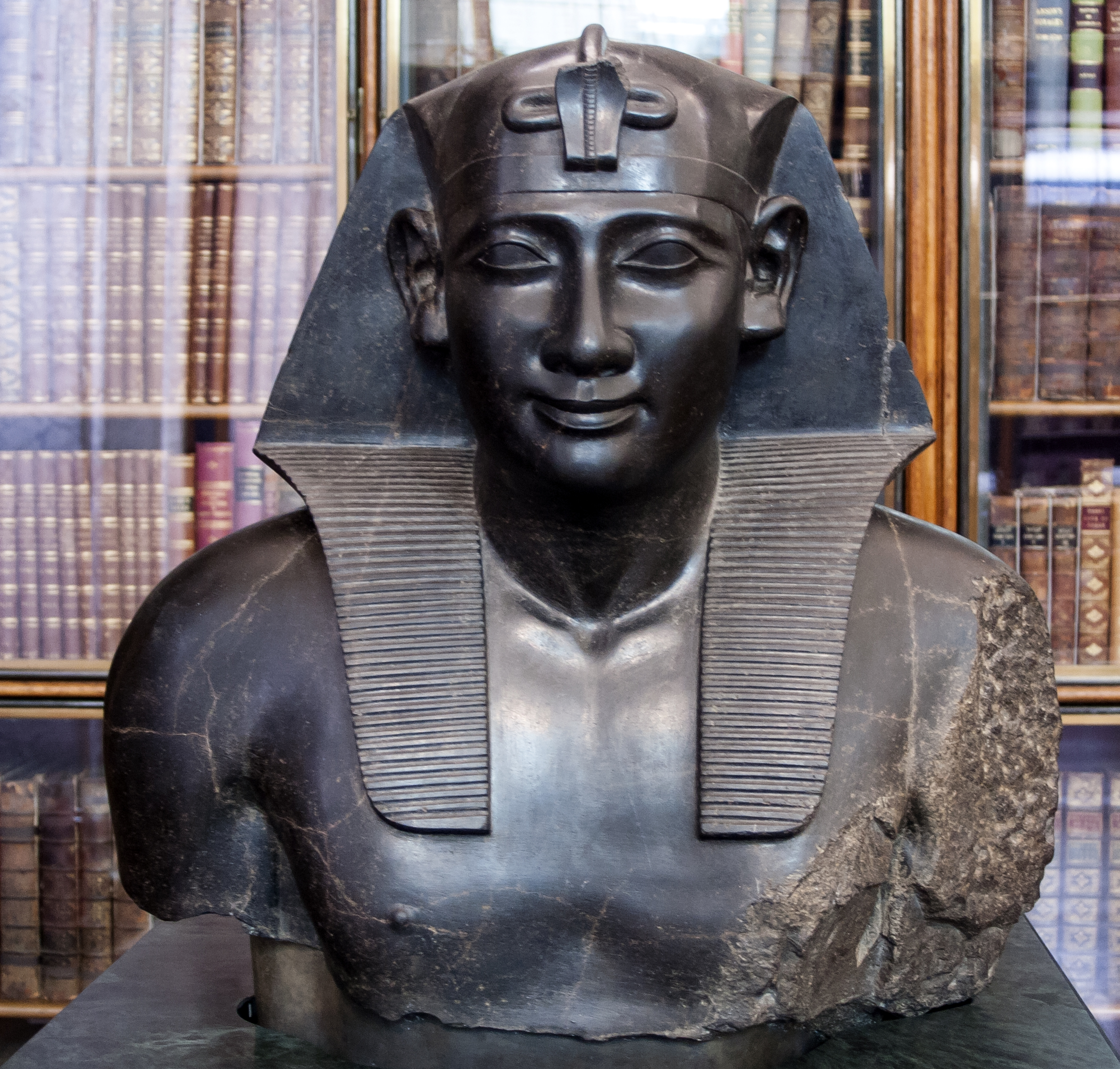 Statyfragment på British Museum föreställande Ptolemaios.